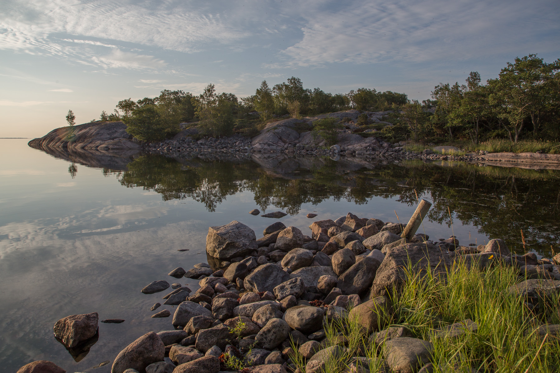 Blick riktning österut från Älveskärs nordvästra strand